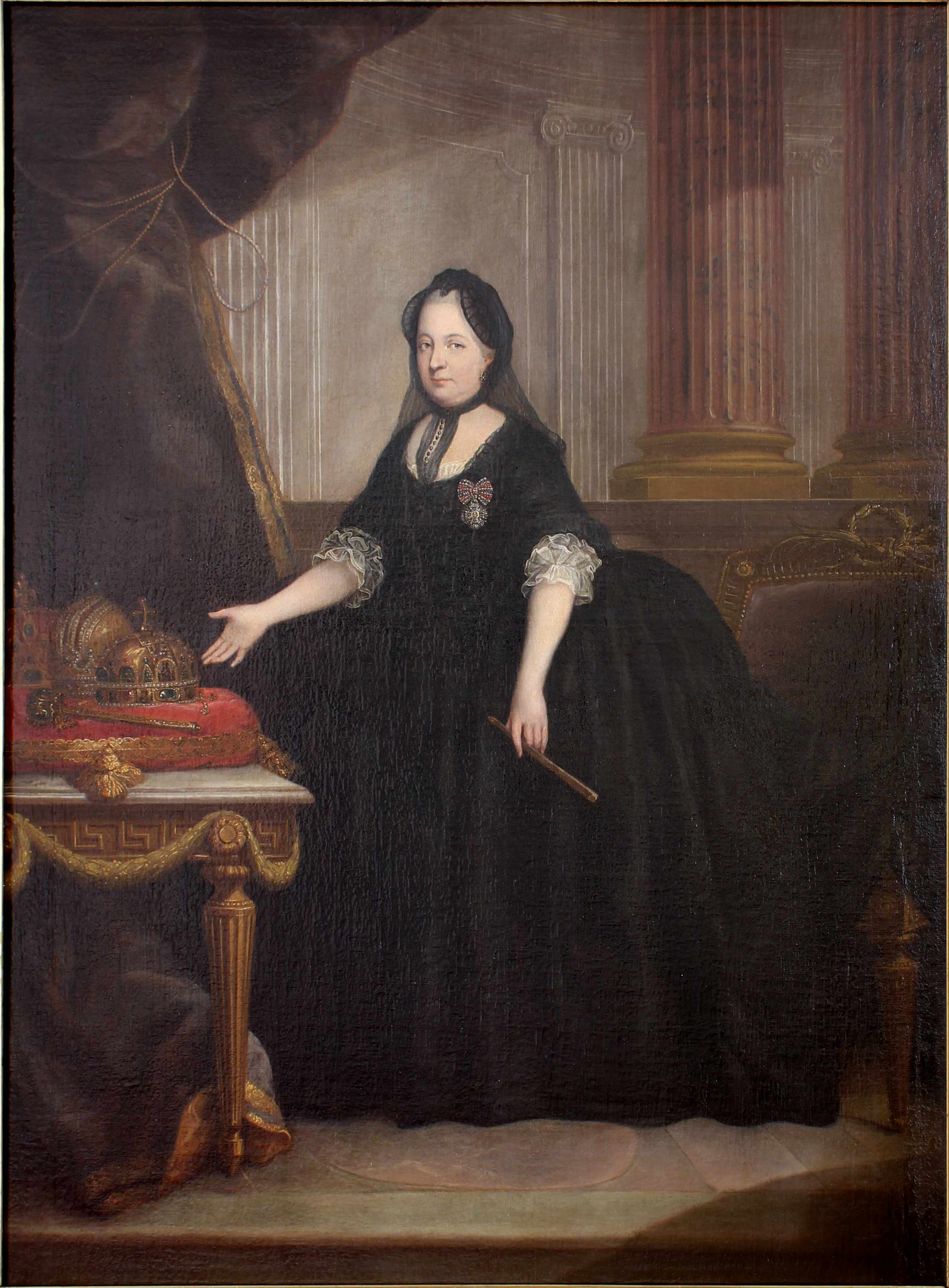 Portrait en pied de Marie-Thérèse de Habsbourg, impératrice d'Autriche, en costume de veuve, présentant les couronnes de Bohème, de Hongrie, et la couronne impériale.